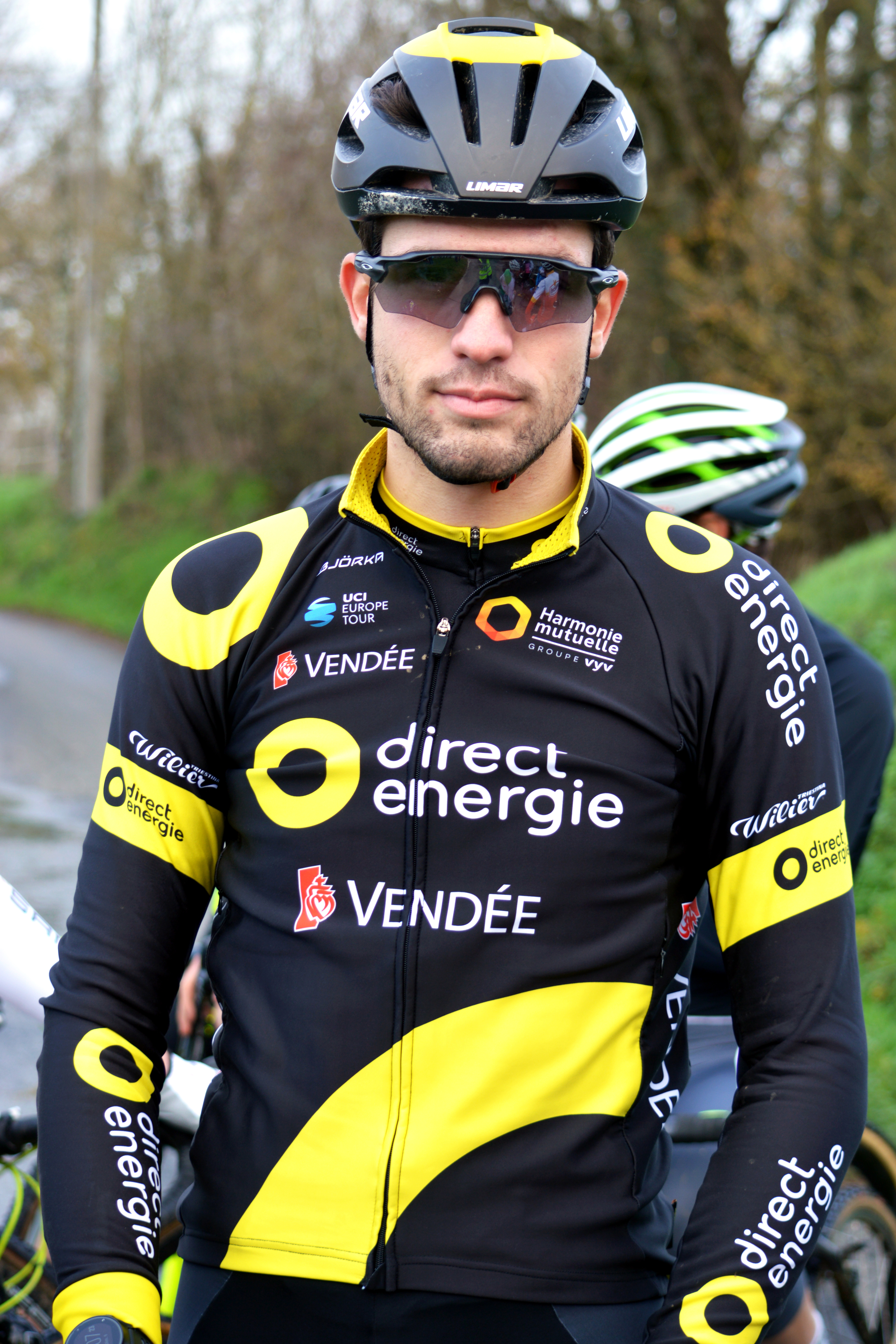 Paul OURSELIN - Cyclo-cross Montbron-Eymoutiers (décembre 2018)